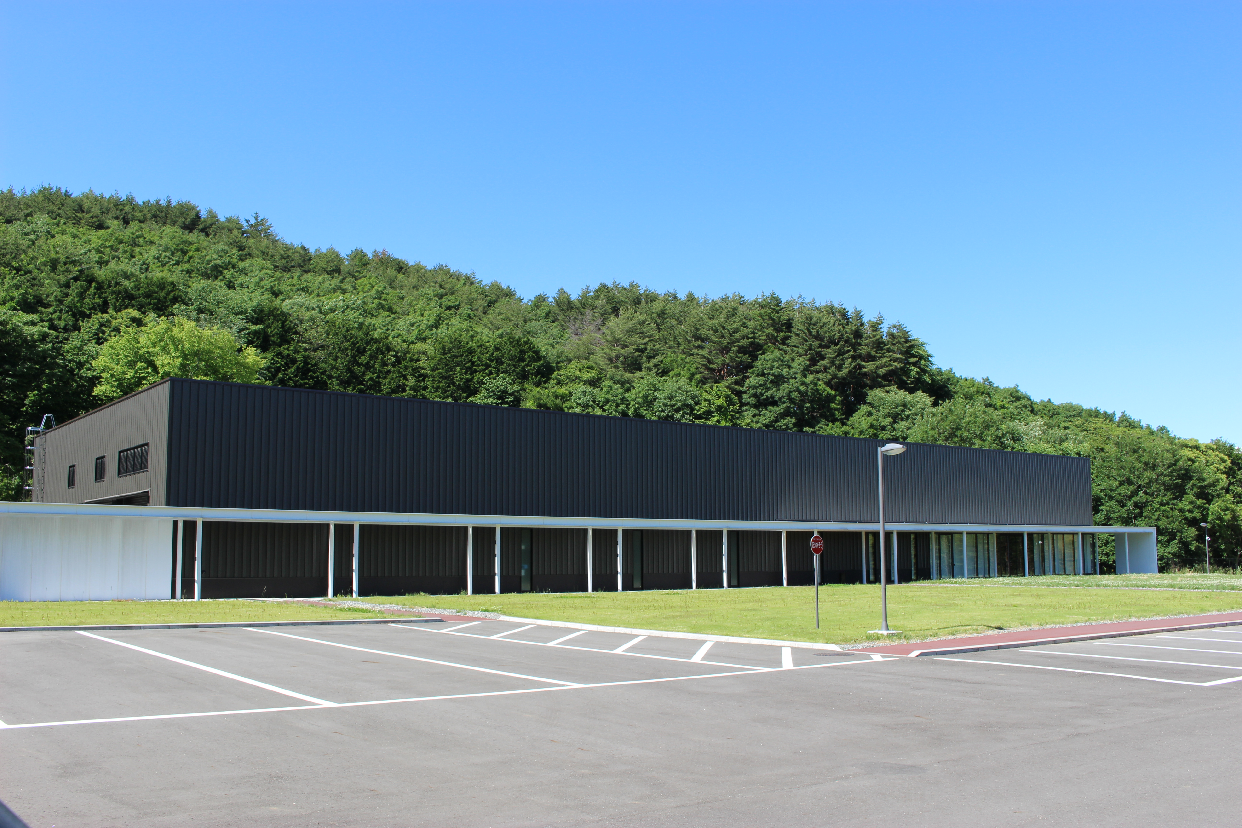 ふくしま逢瀬ワイナリー